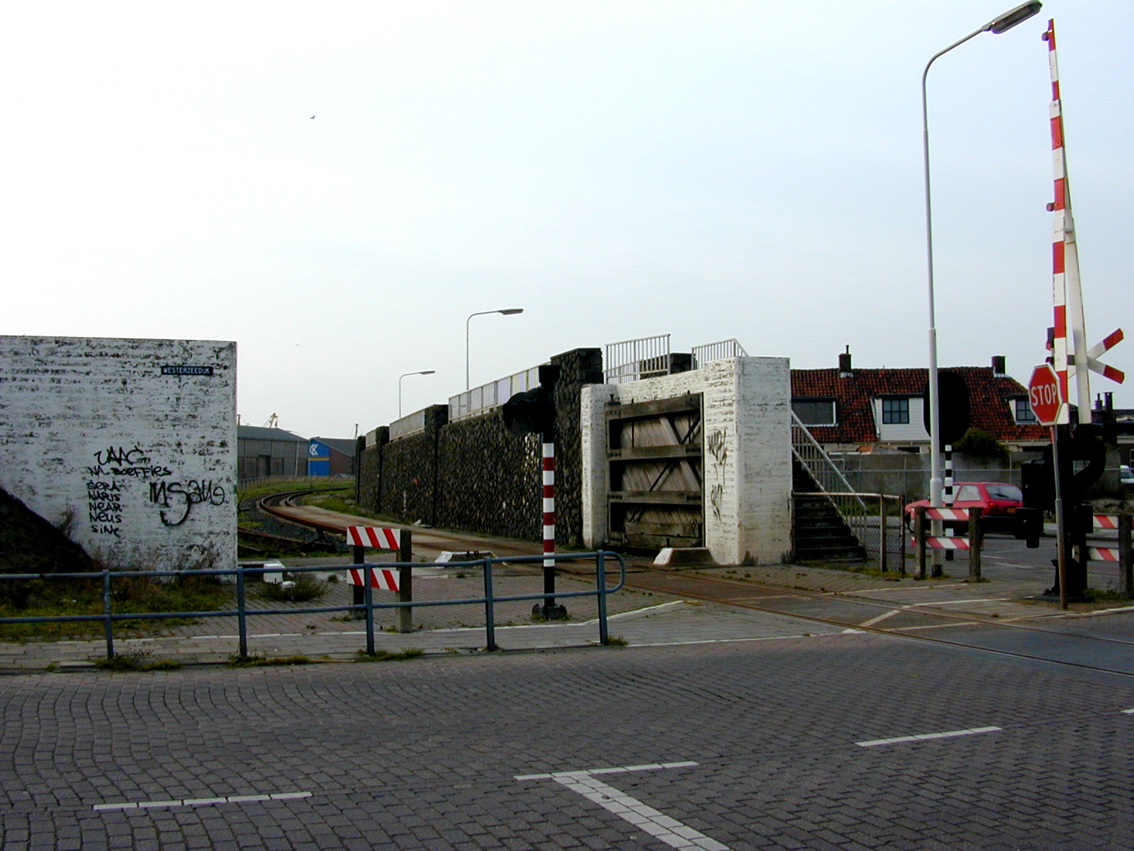 Harlingen haven, de voormalige Coupure bij de overweg aan de Westerzeedijk in de Staatslijn B.